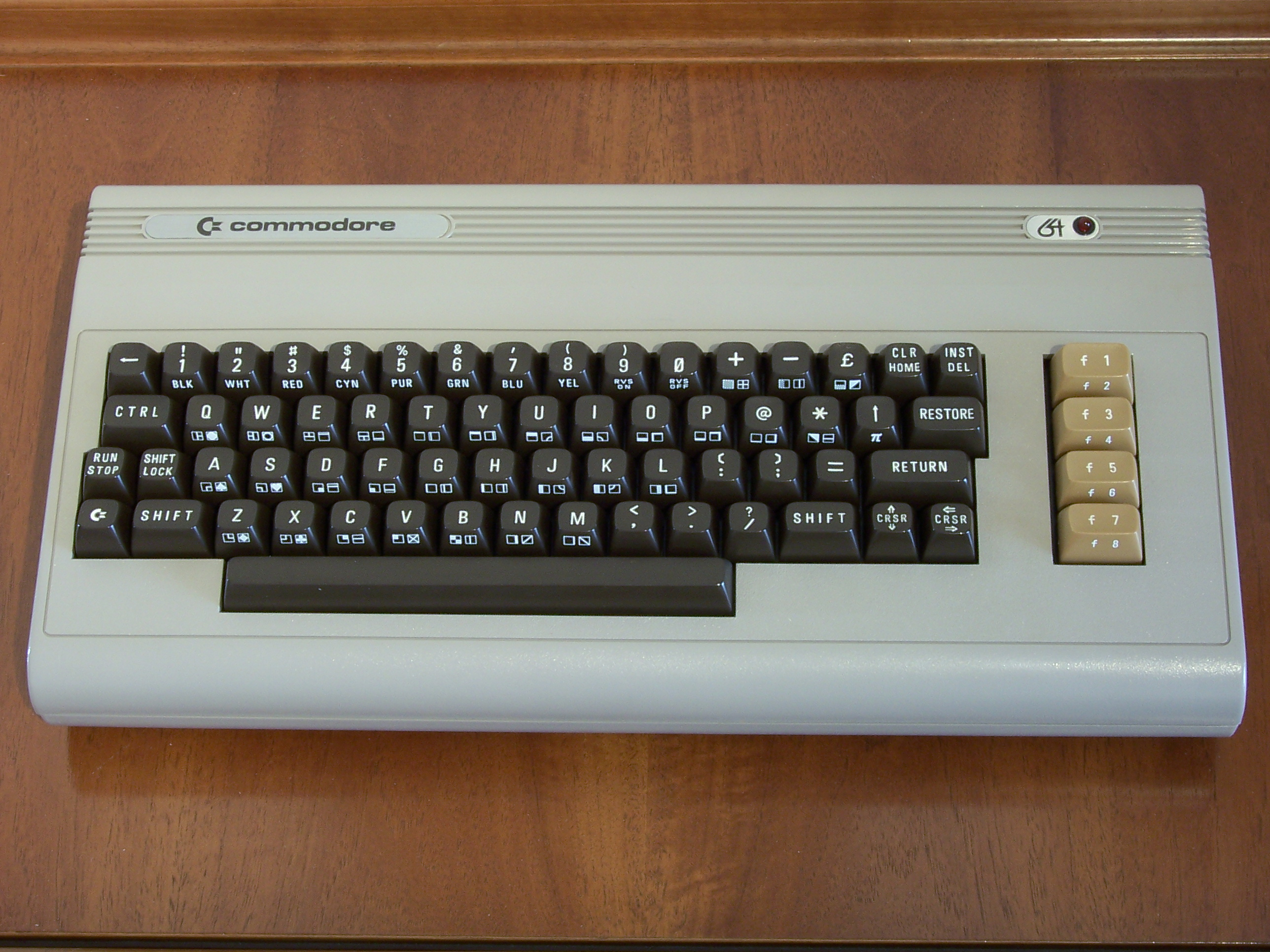 Autore: Matteo Caccia (powerhp73) Fonte: collezione privata Descrizione: Commodore 64 - 1988 - Made in USA Autorizzo l'uso in Wikipedia secondo la licenza indicata.